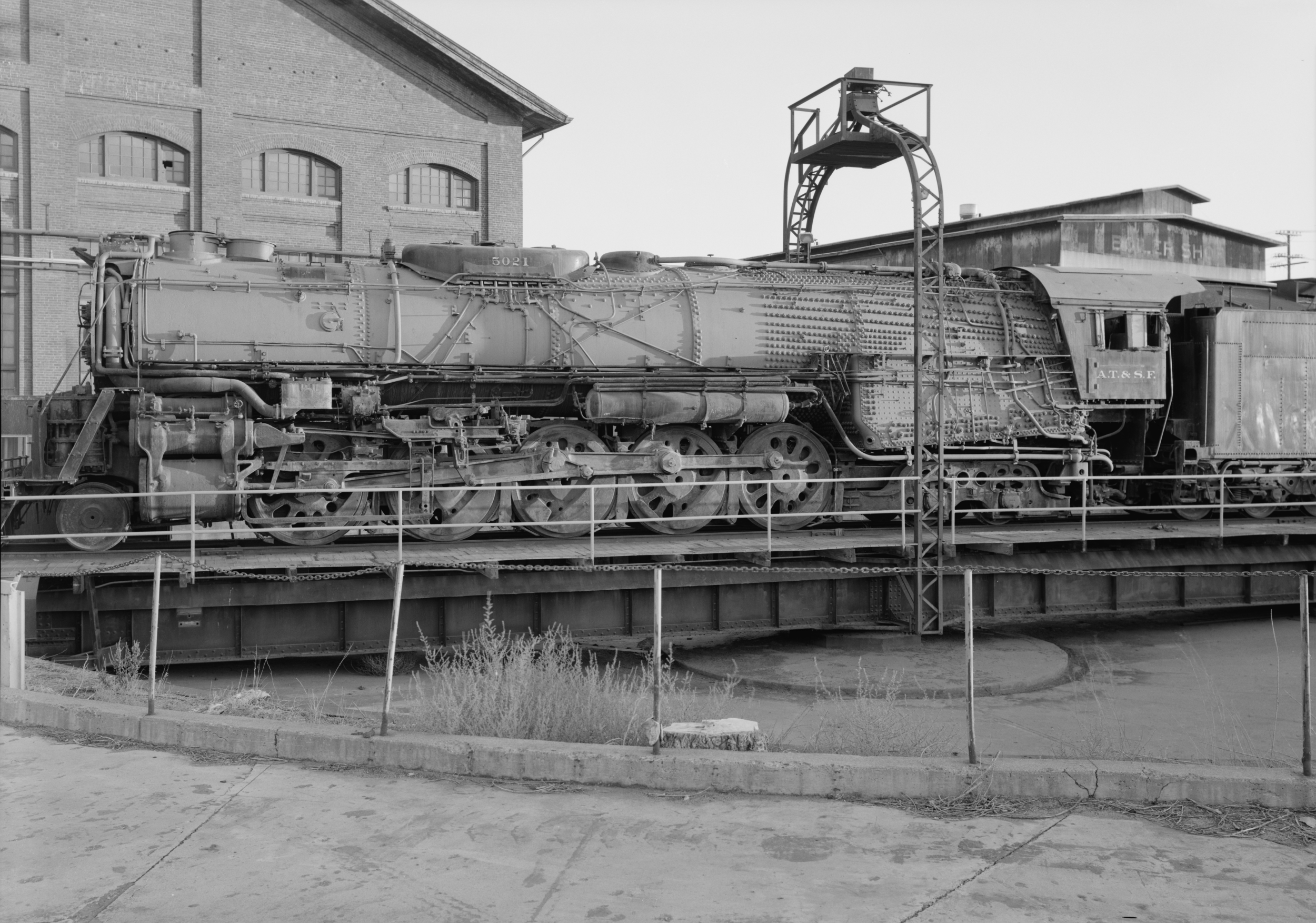 TURNTABLE, WITH ATSF 5021, UNRESTORED 2-10-4 STEAM LOCOMOTIVE, LOOKING SOUTH.